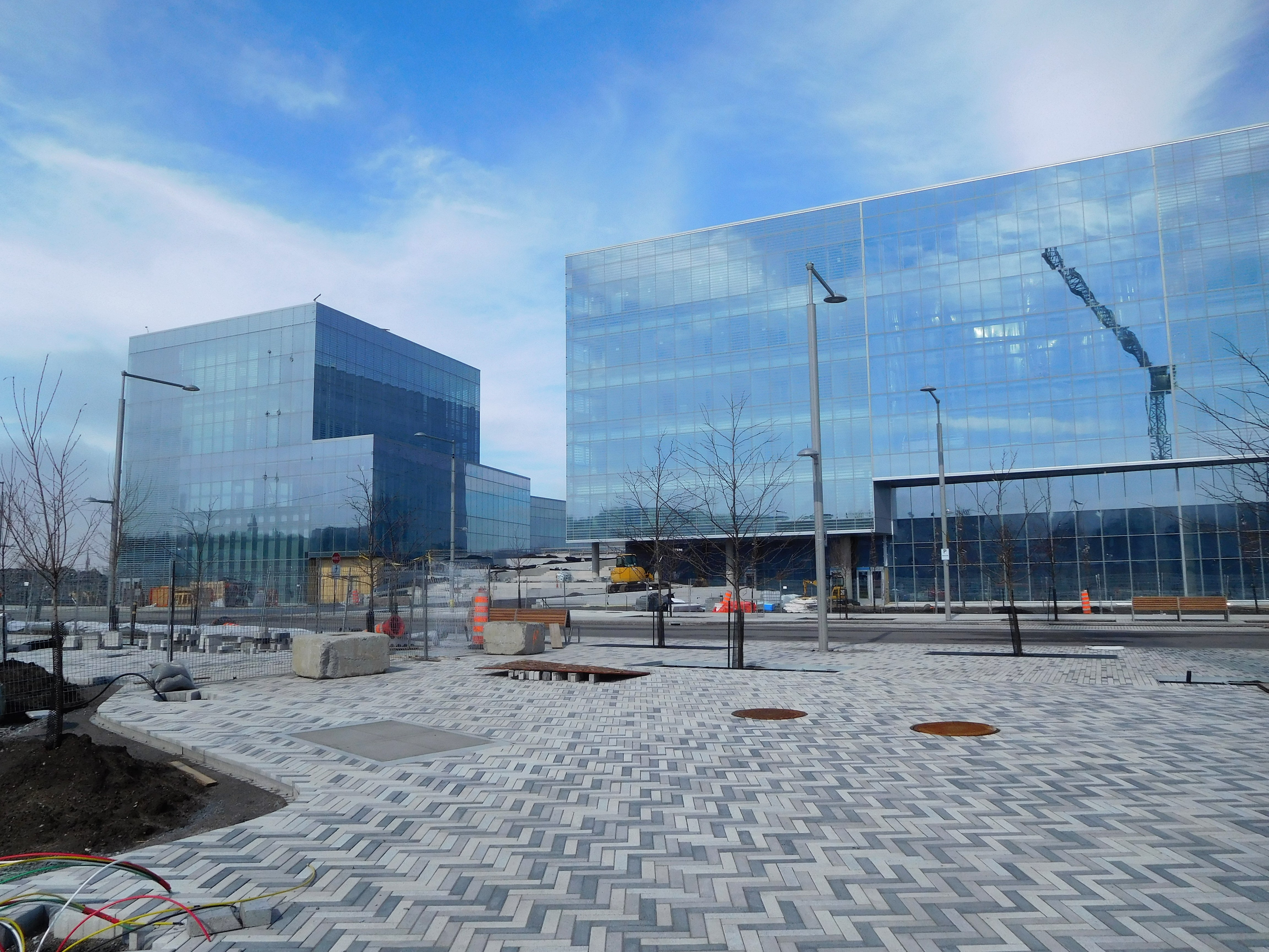 Complexe des sciences de l'Université de Montréal, campus MIL, Outremont